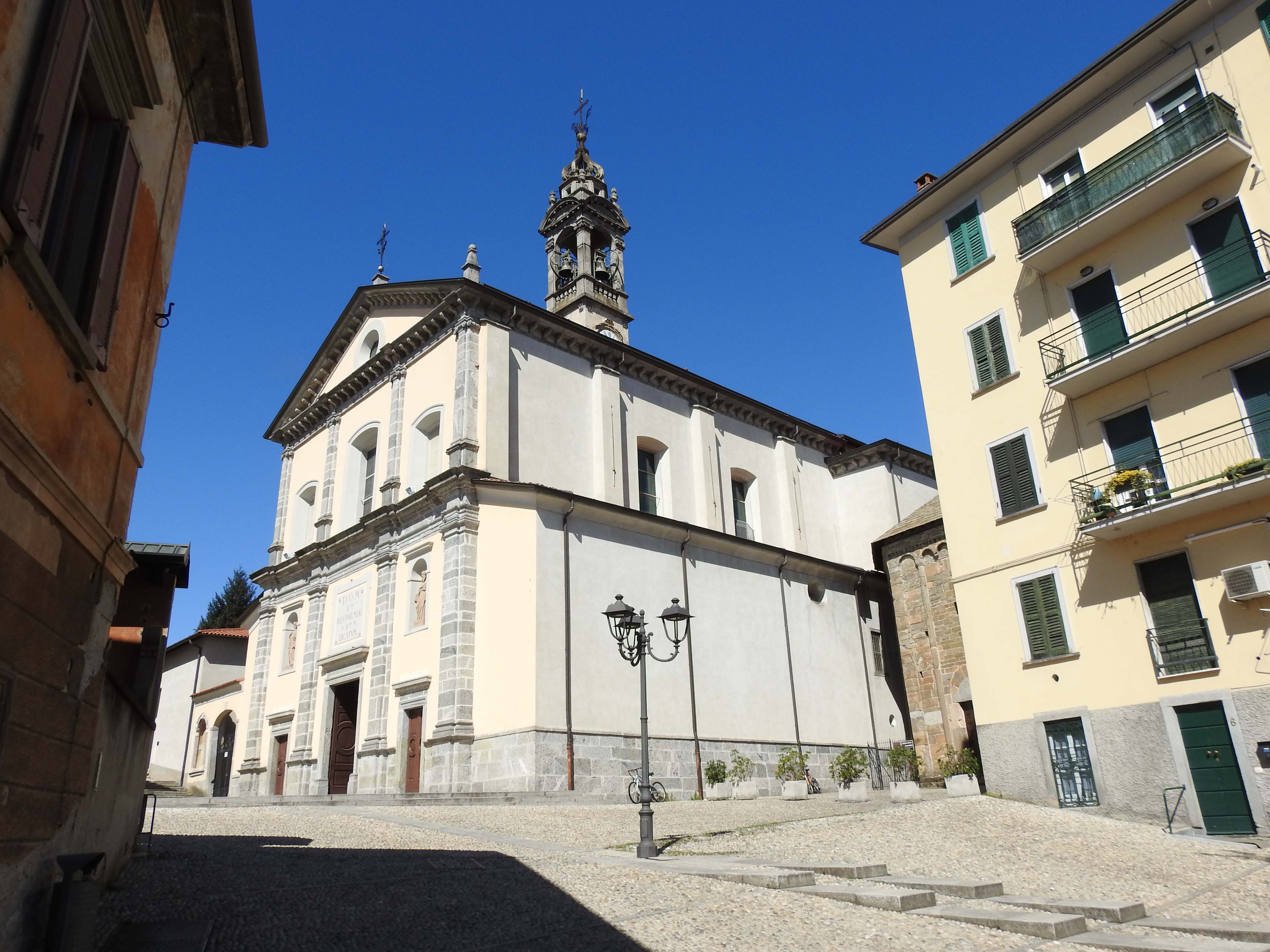 Piazza della Chiesa in Oggiono